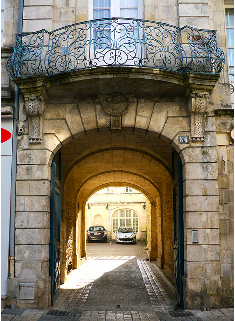 Ancien hôtel de Mac Nemara, construit vers 1725, mais façade construite vers 1770, comtpte tenu du style.